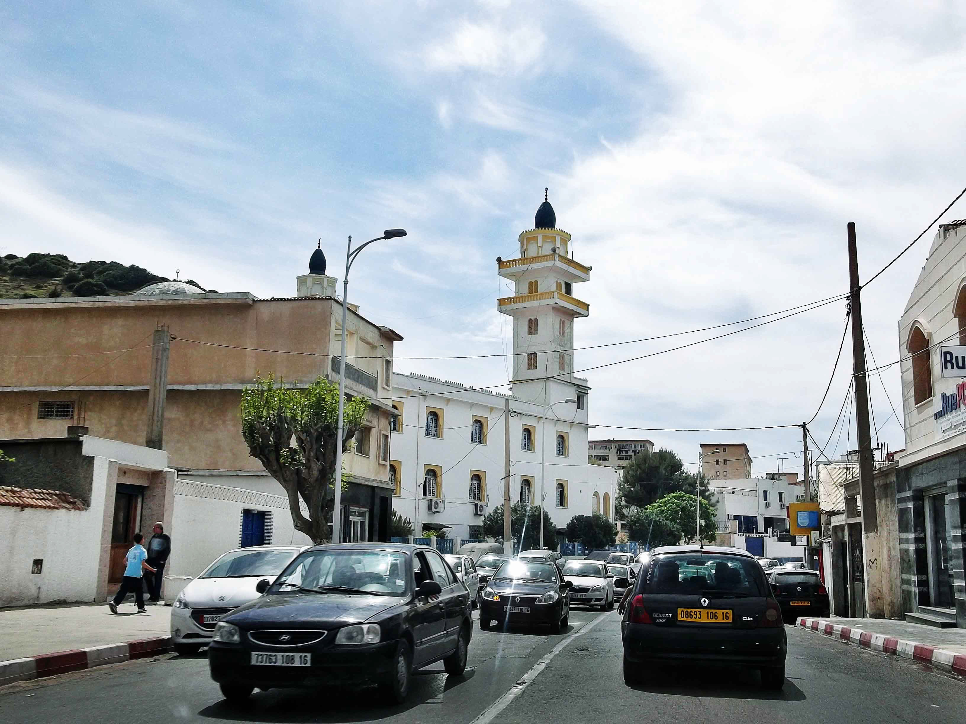 بلدية الحمامات بالجزائر Commune d'El Hammamet (Ex Bains Romains), Alger